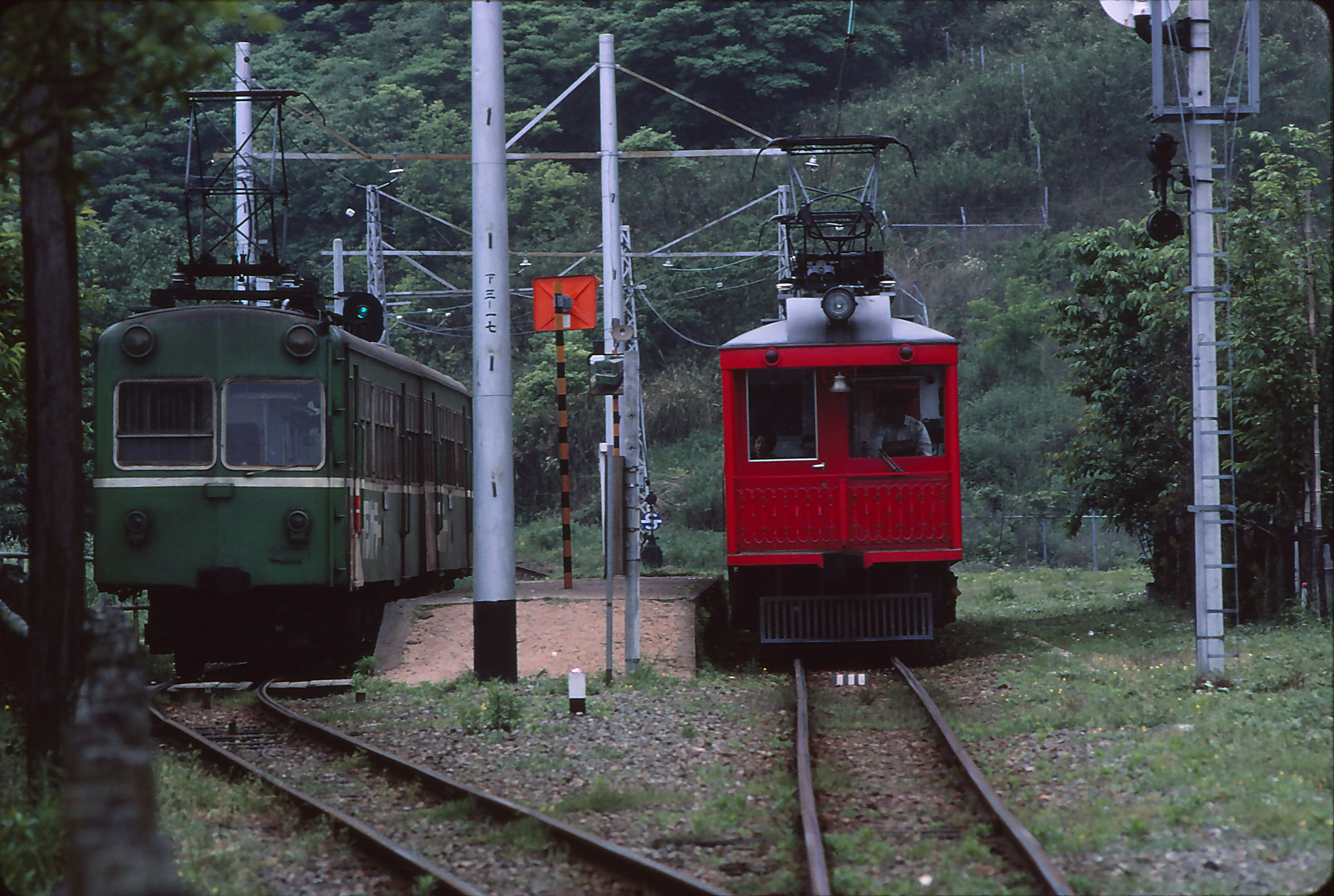 下津井電鉄琴海駅 フジカラー号とメリーベル号の交換